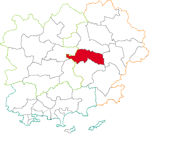 Situation du canton dans la département du Var (83), France